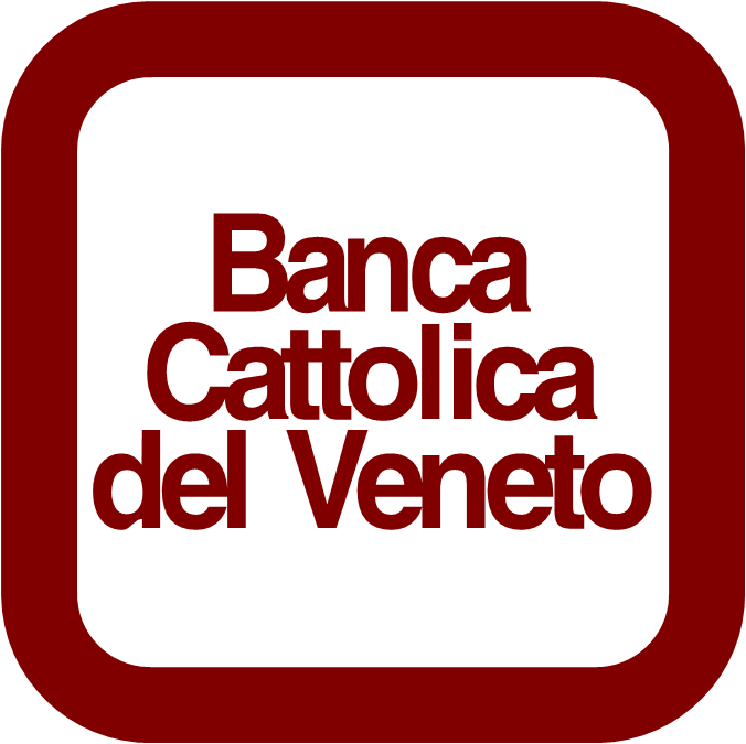 Logo Banca Cattolica del Veneto